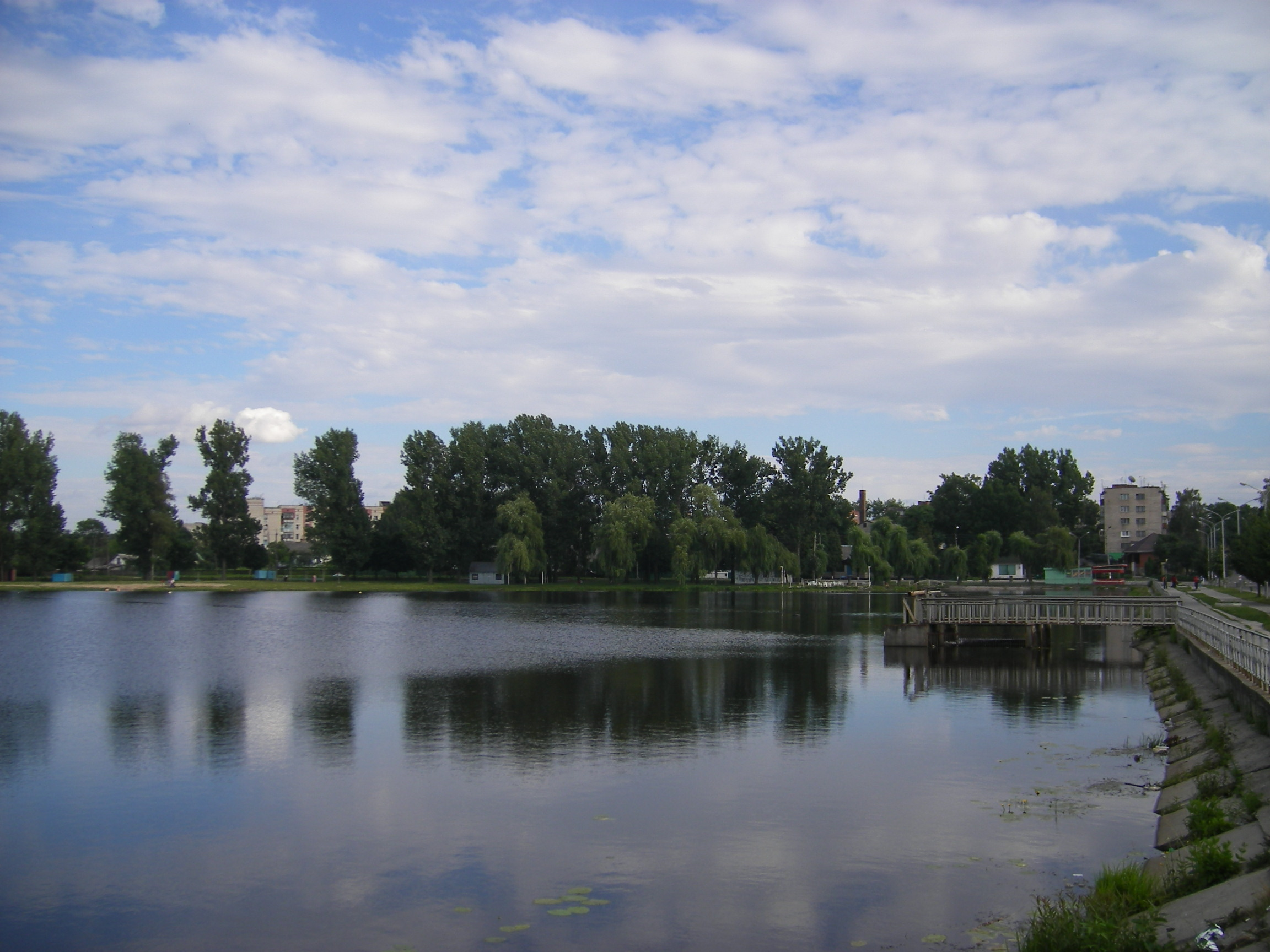 Slavuta, Khmelnitsky Oblast